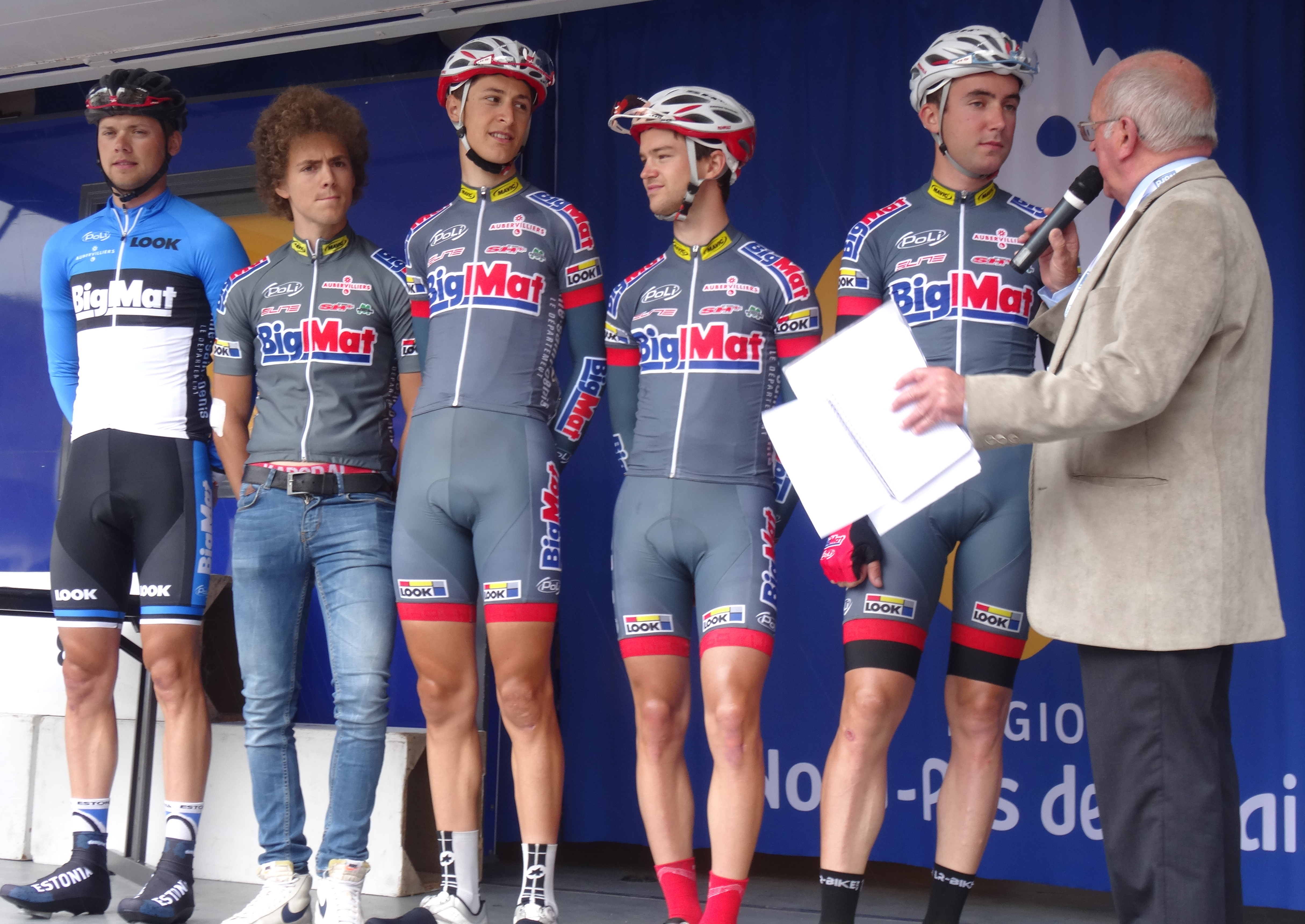 Reportage photographique réalisé le dimanche 13 juillet à l'occasion du départ et de l'arrivée de la Ronde pévéloise 2014 à Pont-à-Marcq, Nord-Pas-de-Calais, France.